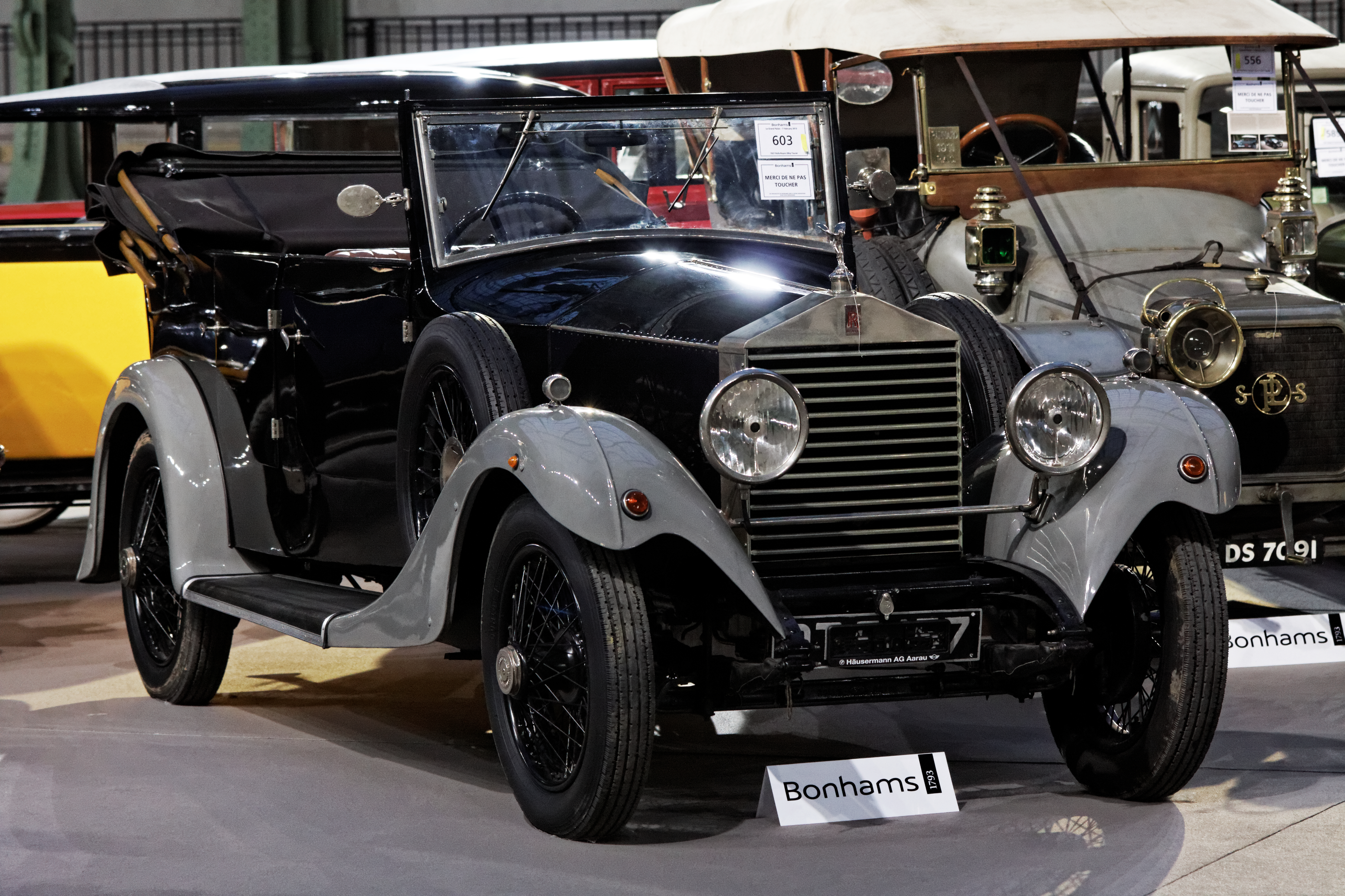 Une Rolls-Royce 20HP tourer de 1927.